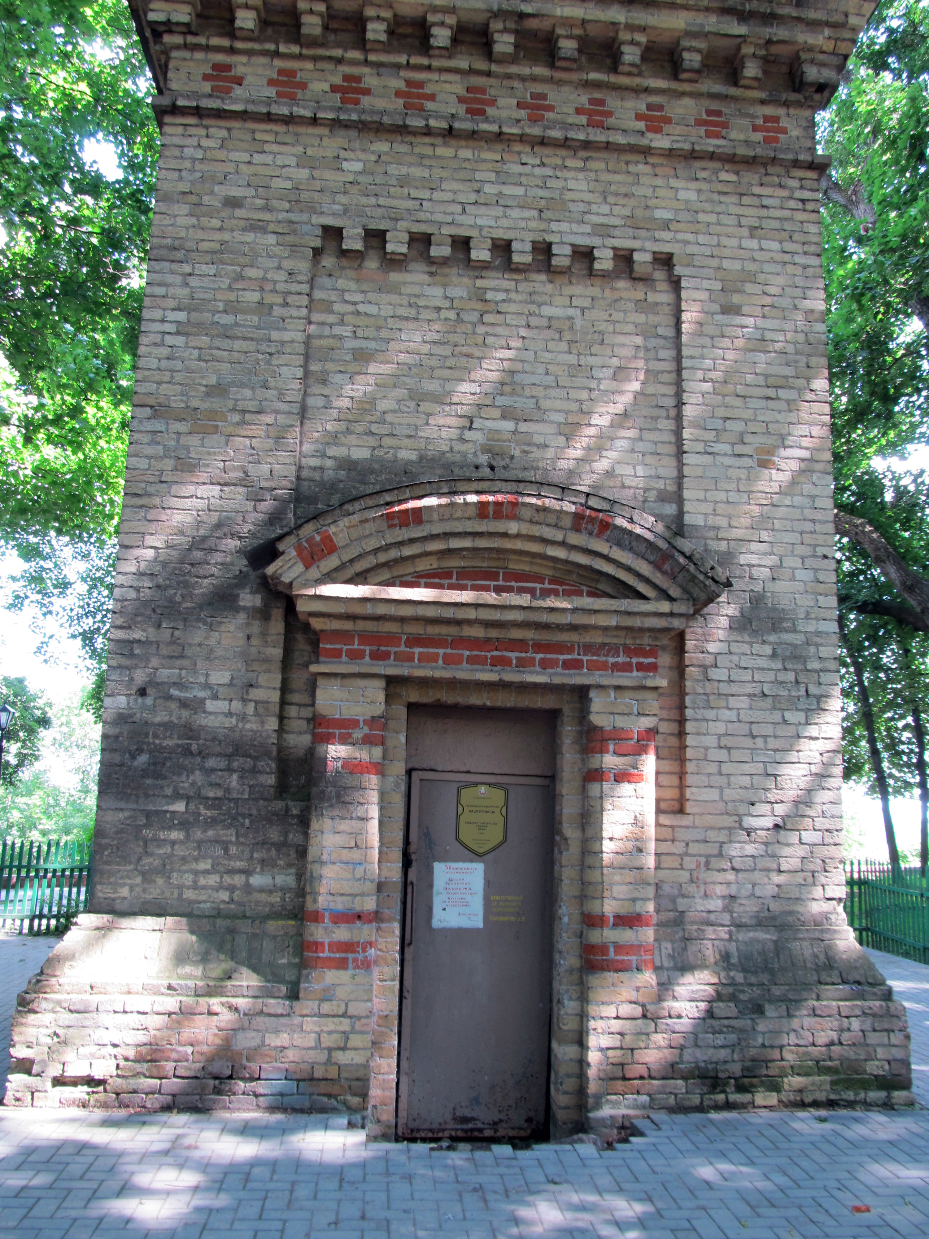 Беларуская (тарашкевіца): Будынак «Зімовы сад» зь вежай. г. Гомель This is a photo of Belarusian heritage monument. Reference number: 312Г000050 ( WLM)